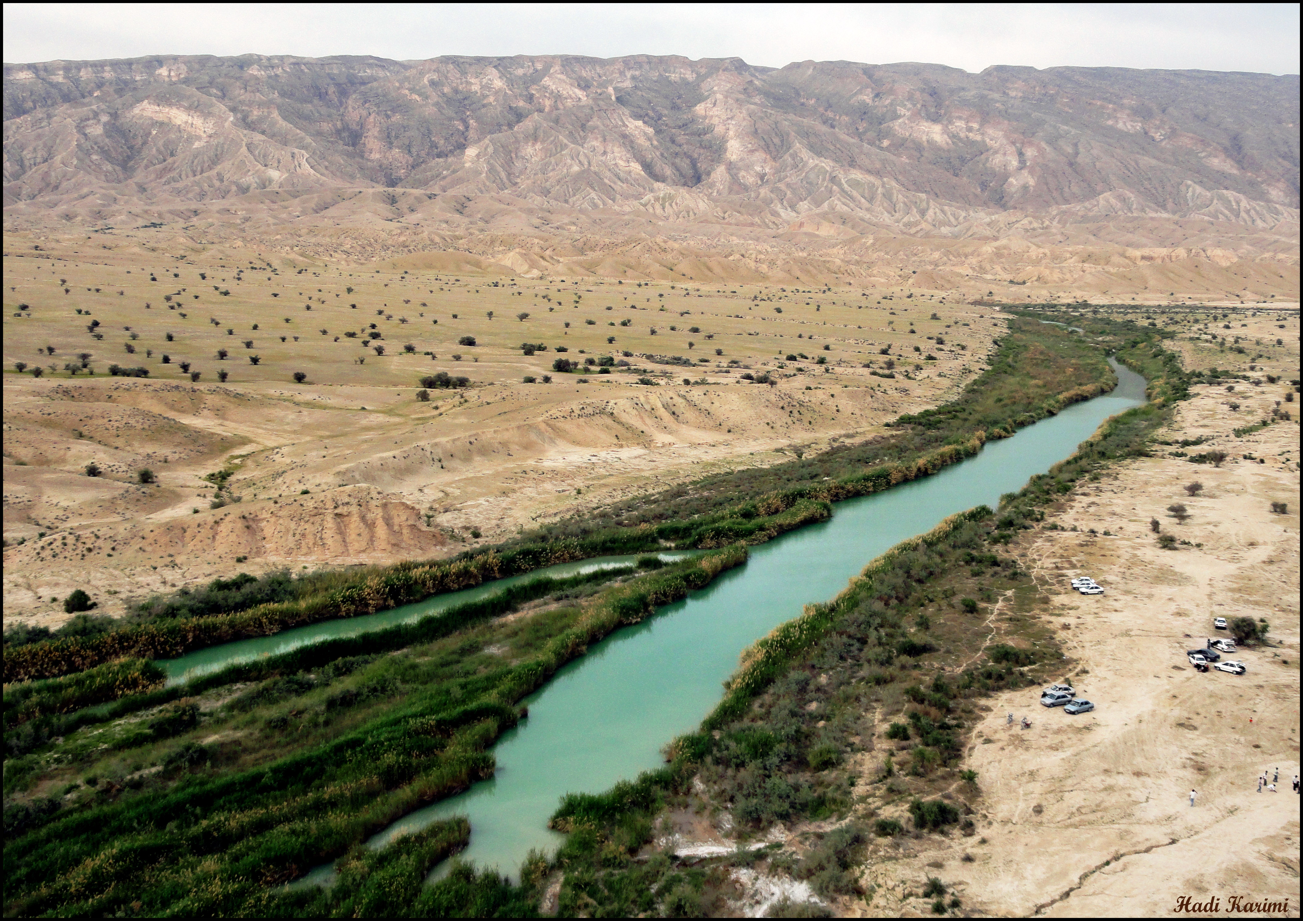 Alamarvdasht River رود علامرودشت در انتهای دشت